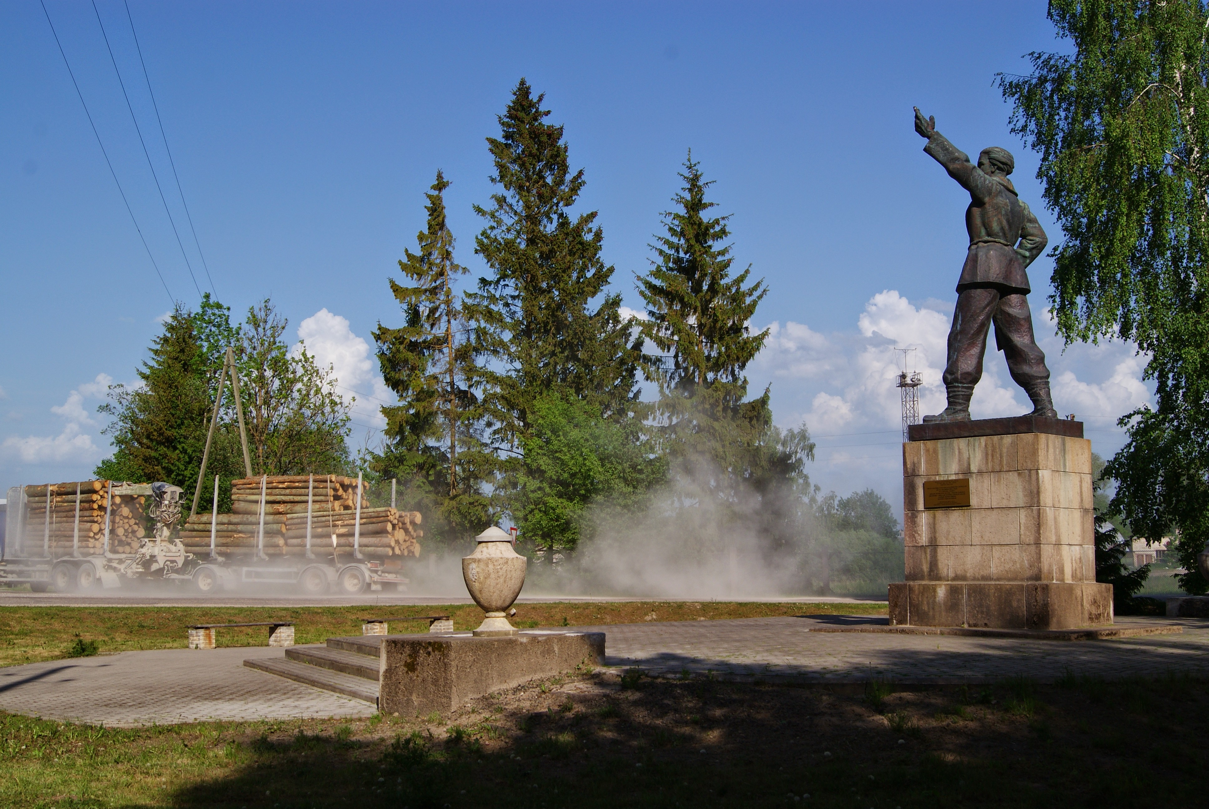 "Bleķa Miķelis"